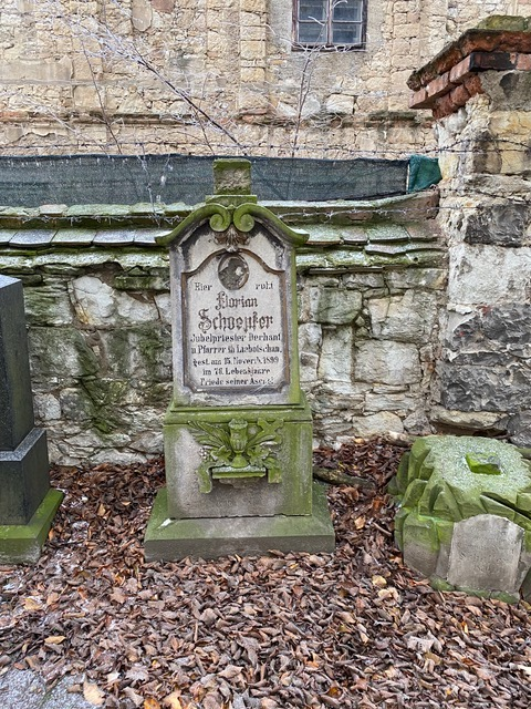 R.D. Florian Schöpfer, kněžský hrob v Libočanech